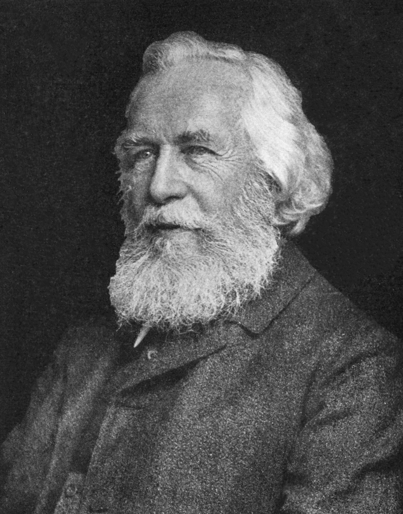 Ernst Heinrich Philipp August Haeckel (February 16, 1834 – August 9, 1919)